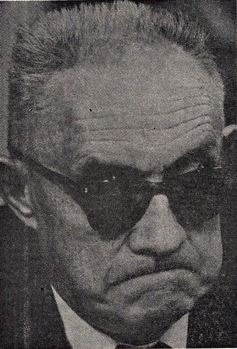 Henry de Montherlant, drammaturgo e scrittore francese